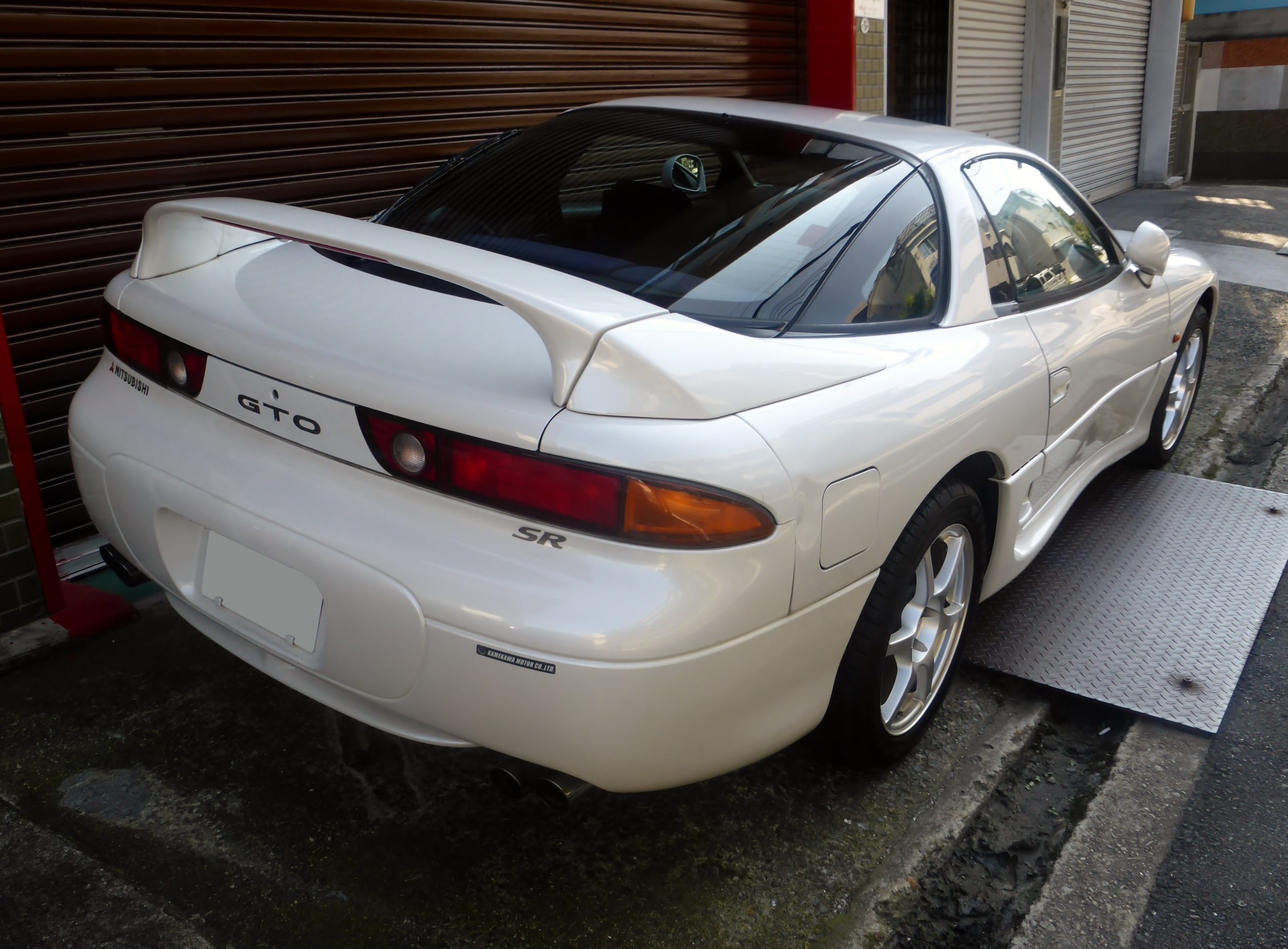 Z15A型三菱・GTO SRをリアから撮影。